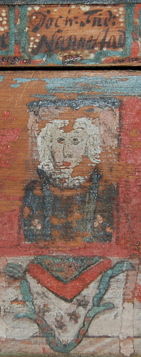 Biskop Fr. Nannestad malt av presten Sigvard Kildal - i Tromsø museum